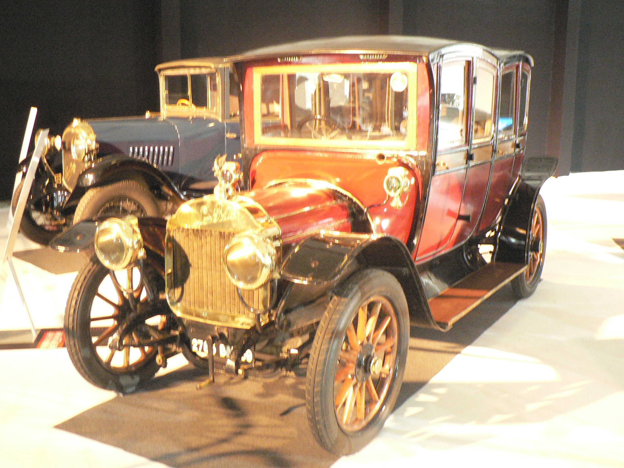 Mondial de l automobile de Paris (October 2006)